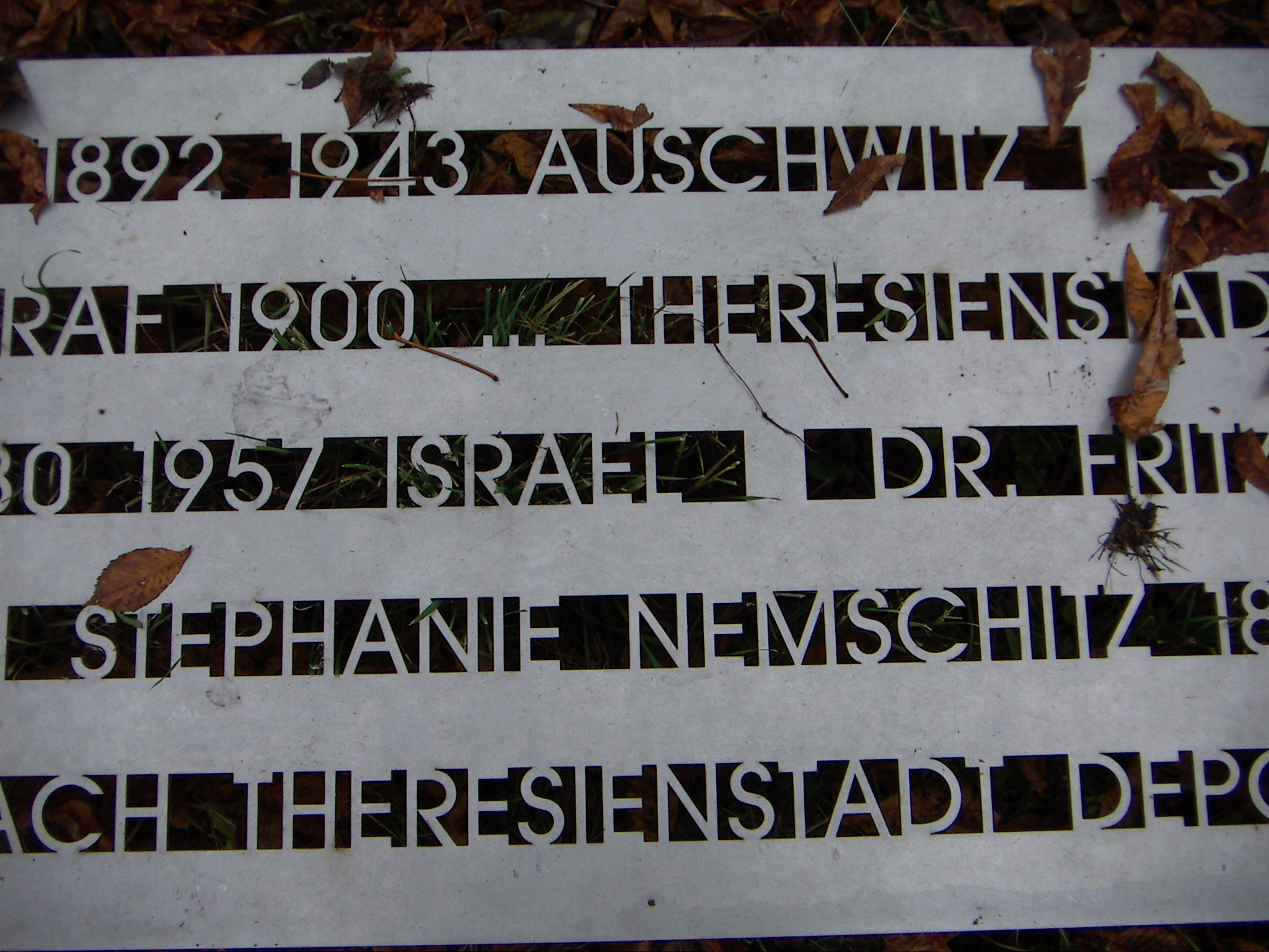 Denkmal (Ausschnitt) im Jüdischen Friedhof Krems in Krems in Österreich